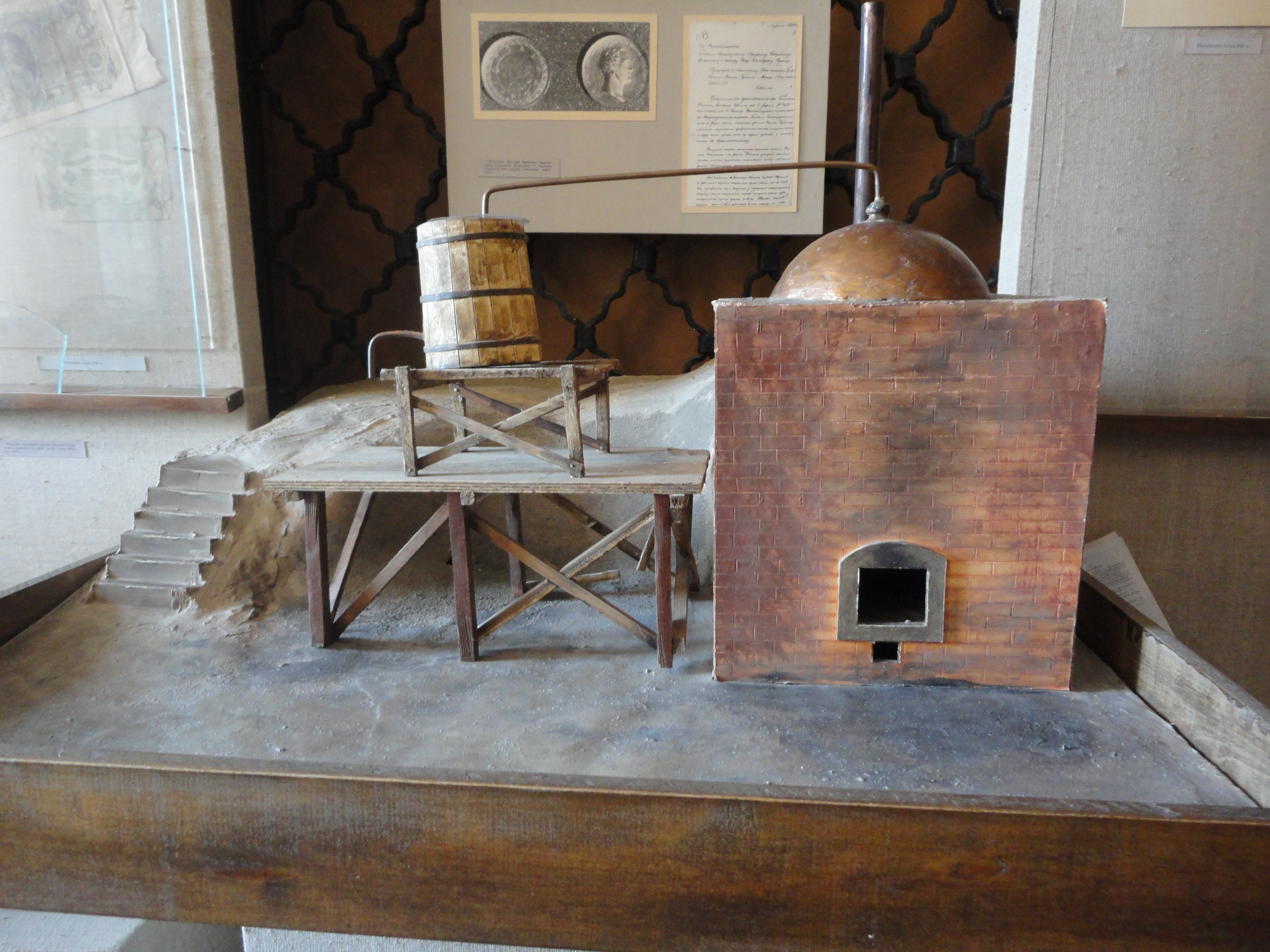 Моздокский краеведческий музей